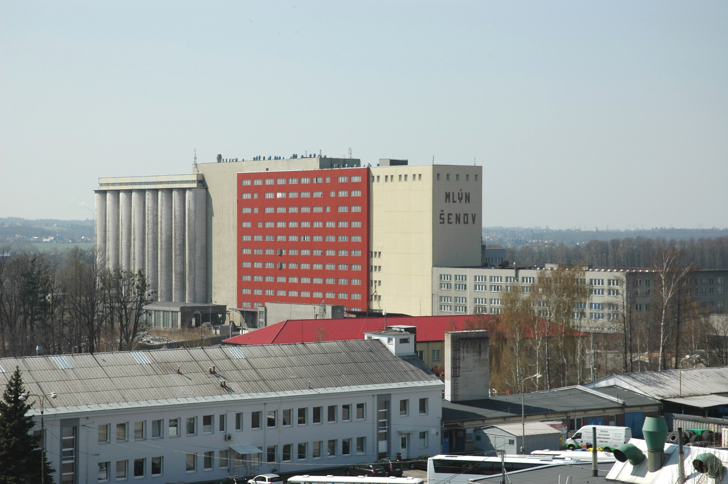 Mlýn Šenov